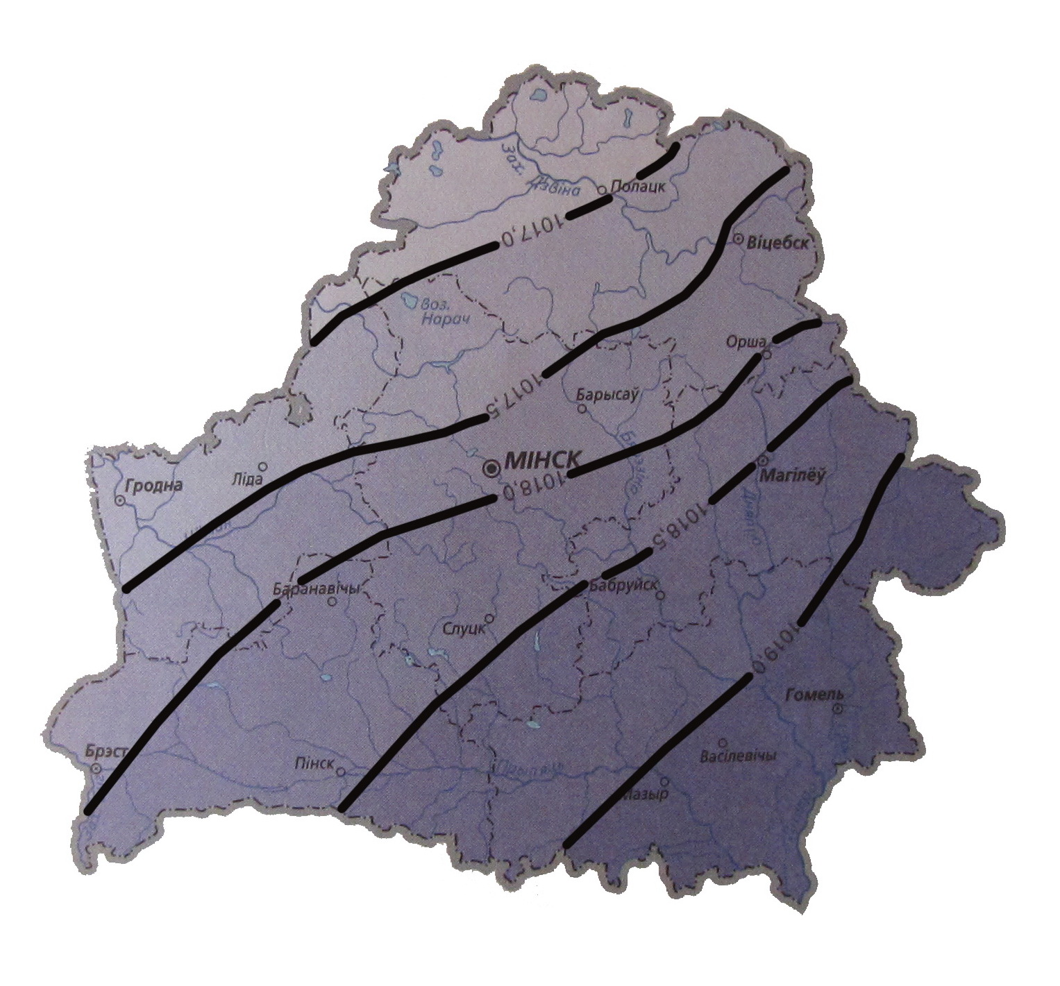 Ізабары на мапе Беларусі